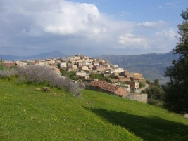 une photo du village Ighil Oumced